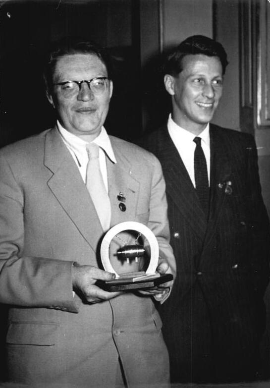 Zentralbild-Gielow 23.5.52 III.Deutscher Schriftstellerkongreß vom 22.-25. Mai 1952 in Berlin. UBz: Nationalpreisträger Kuba im Gespräch und Nationalpreisträger Hermlin.